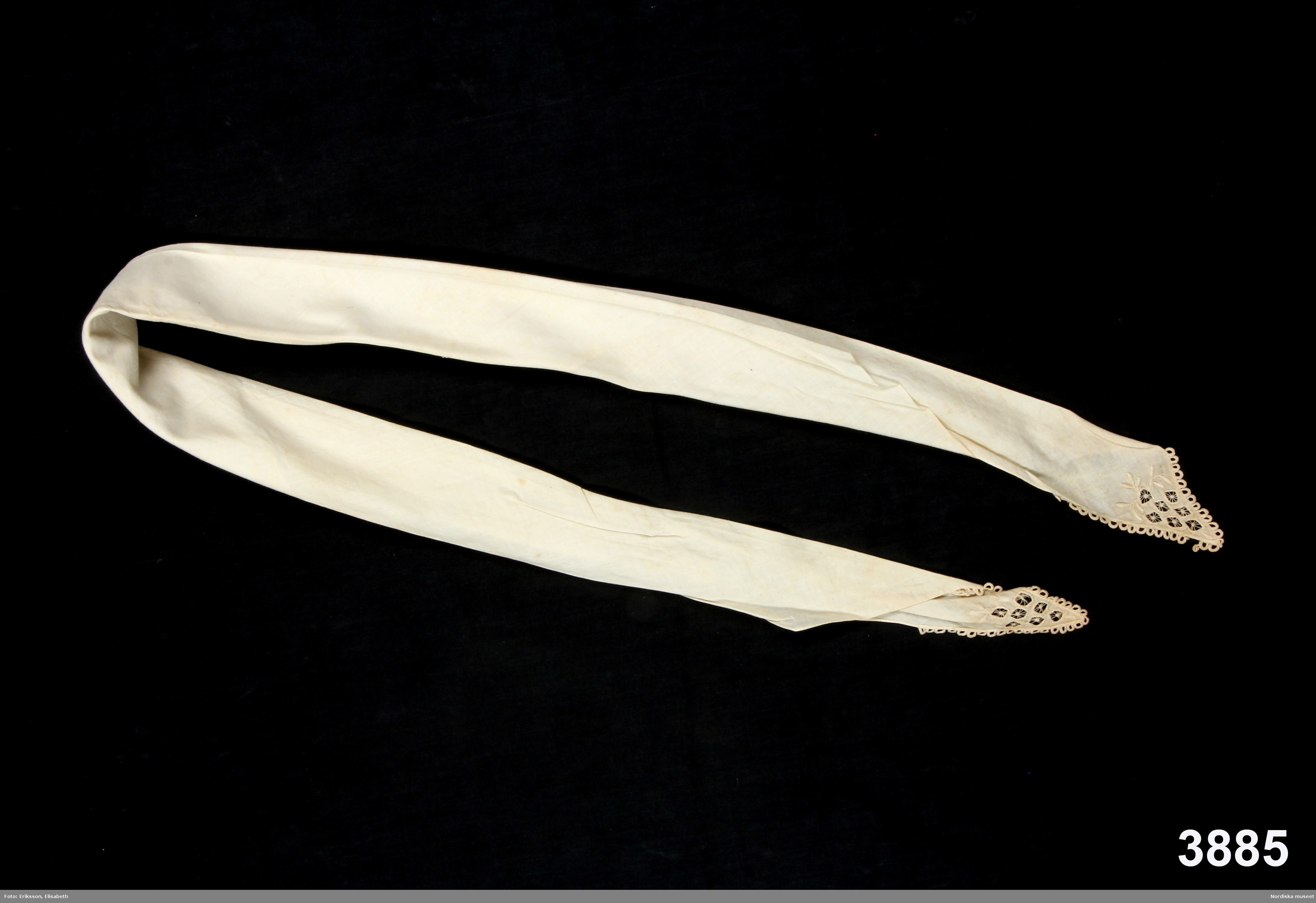 Halsduk